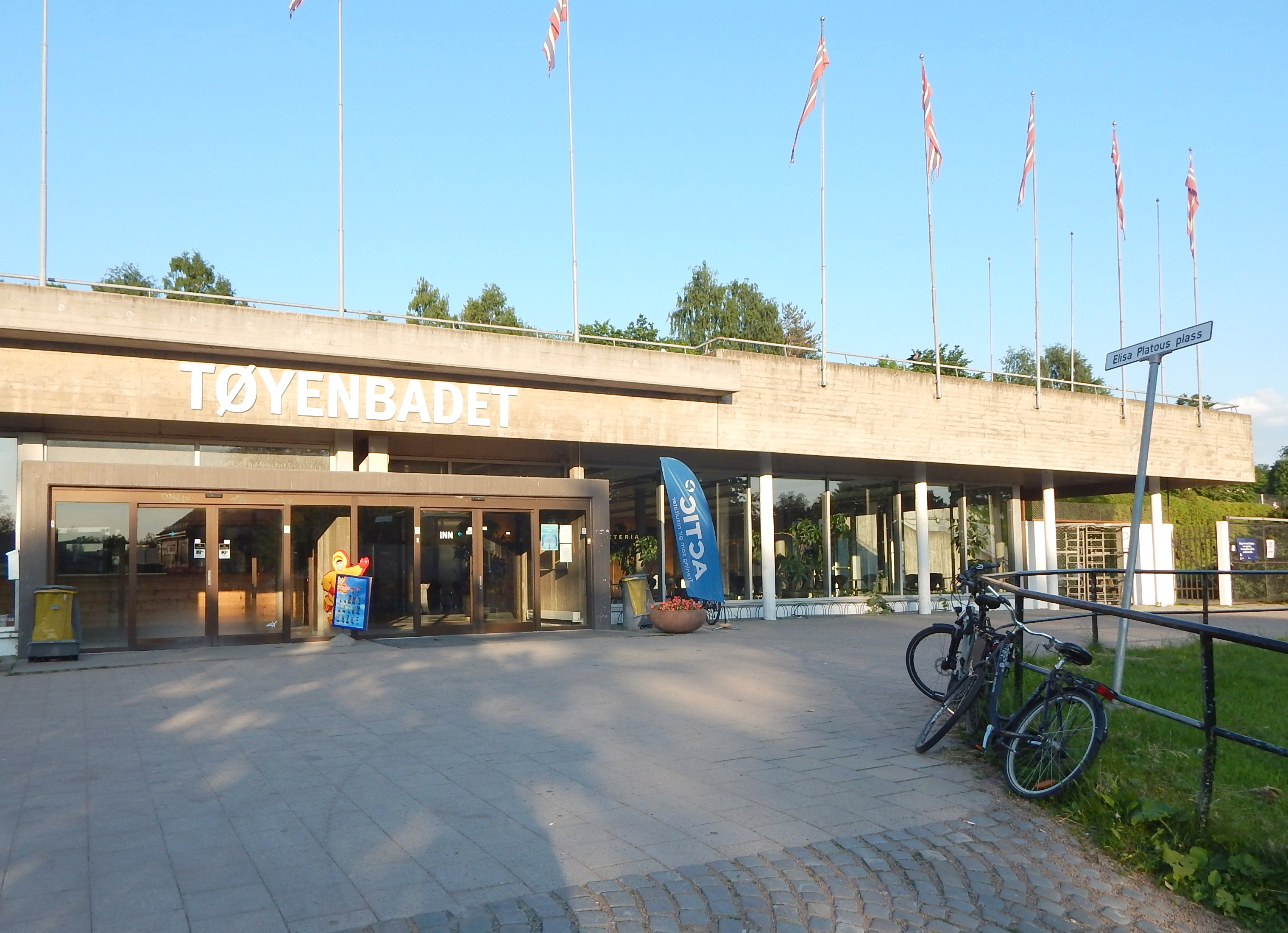 Elisa Platous plass